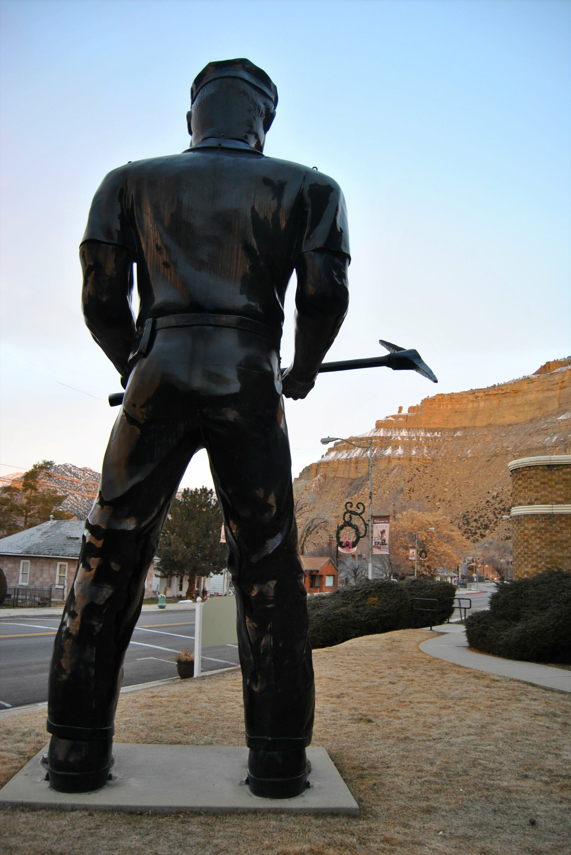 "Big John" Helper Utah